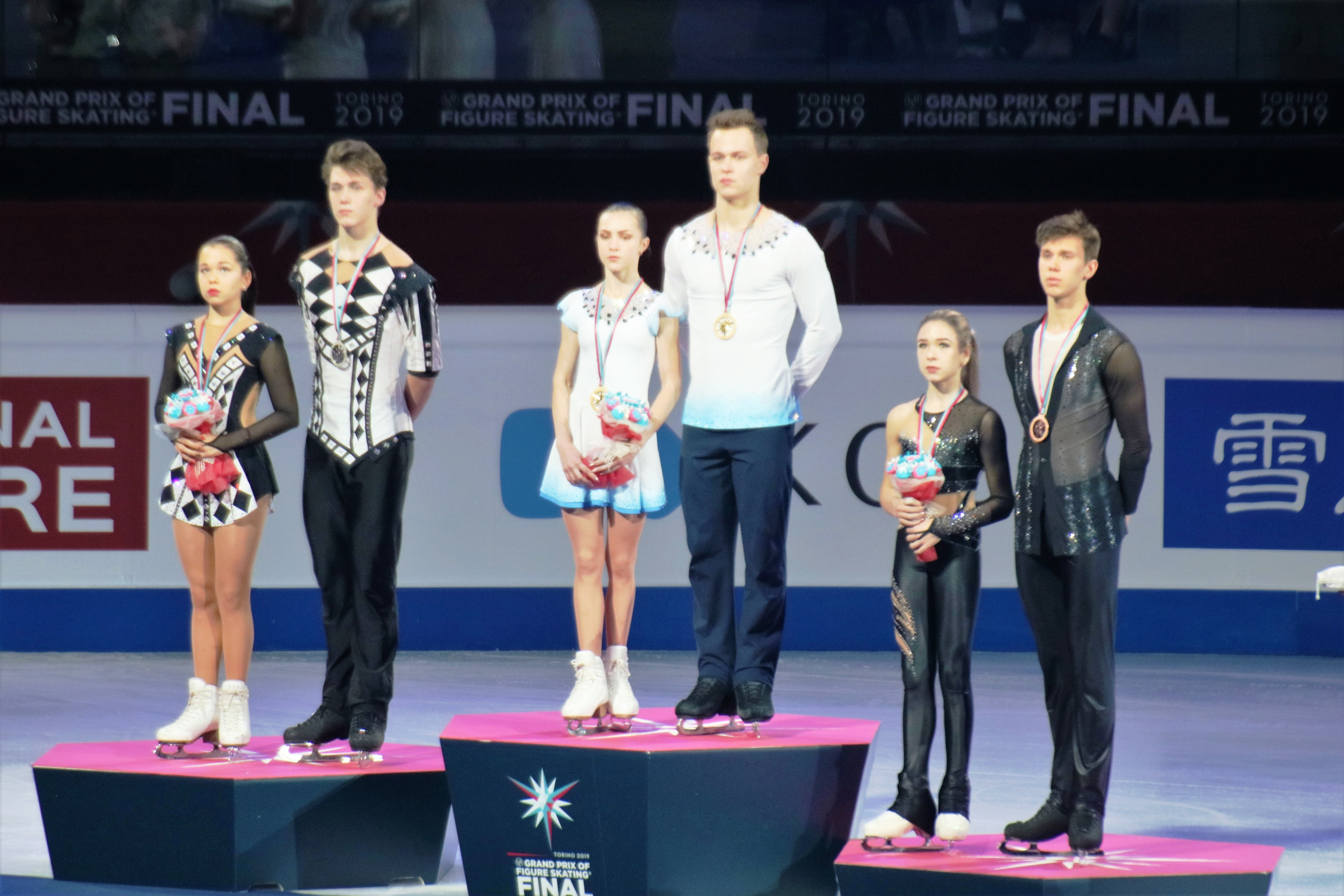 Церемония награждения в парном катании на финале юниорского Гран-при 2019-2020